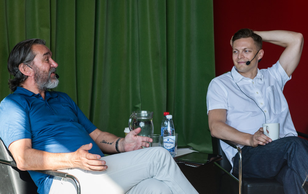 Kjell Bergqvist och Björn af Kleen på Kulturhuset i Stockholm den 11 juni 2015.